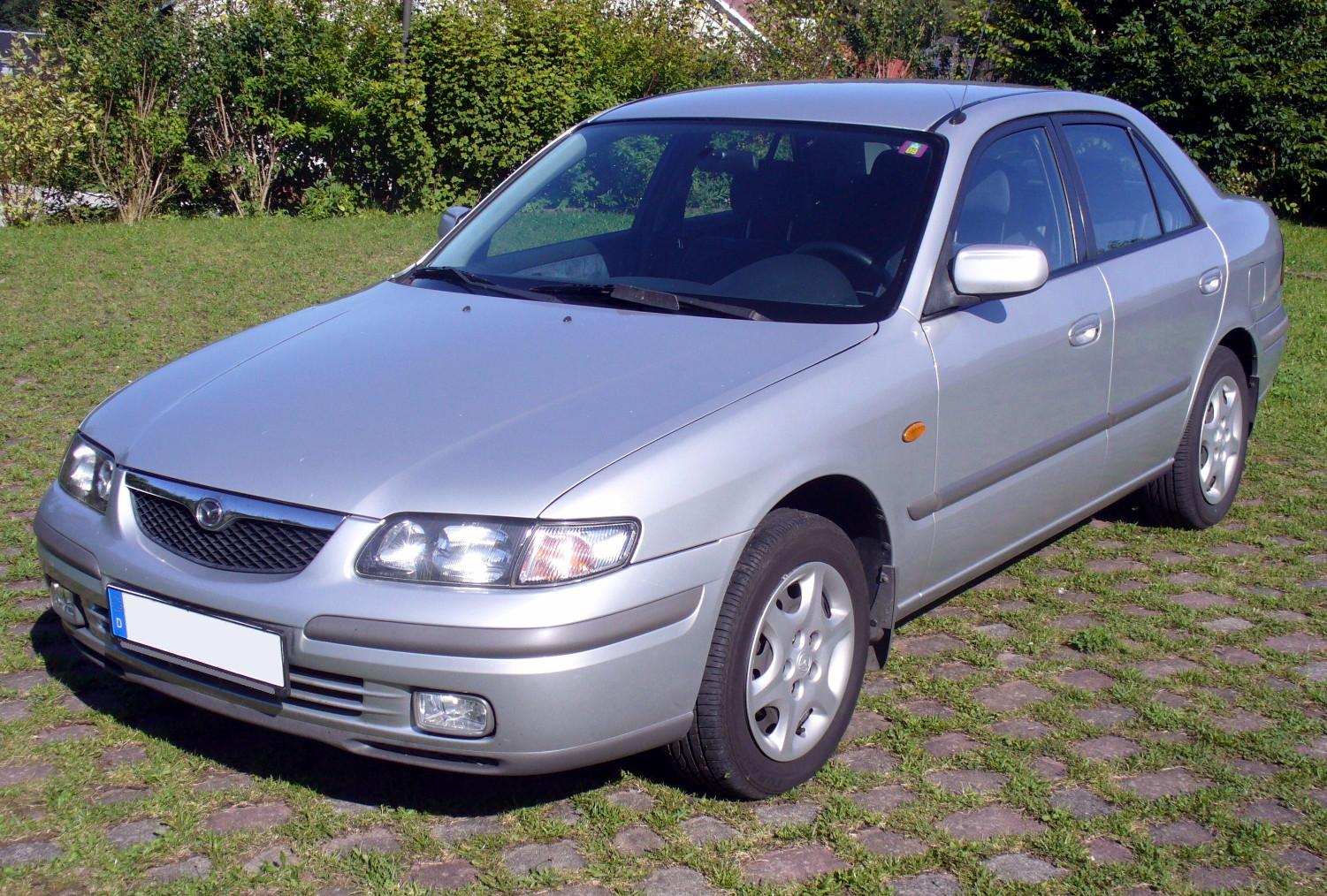 Mazda 626 GF